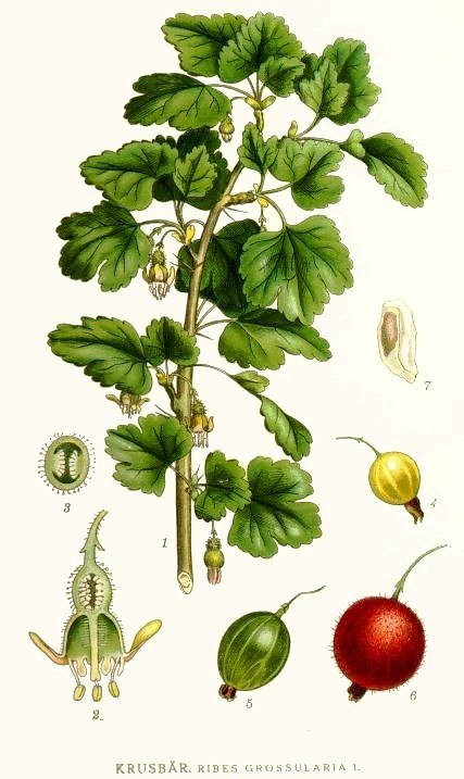 Ribes uva-crispa L., syn. Ribes grossularia L. Original Description Krusbär, Ribes grossularia L.